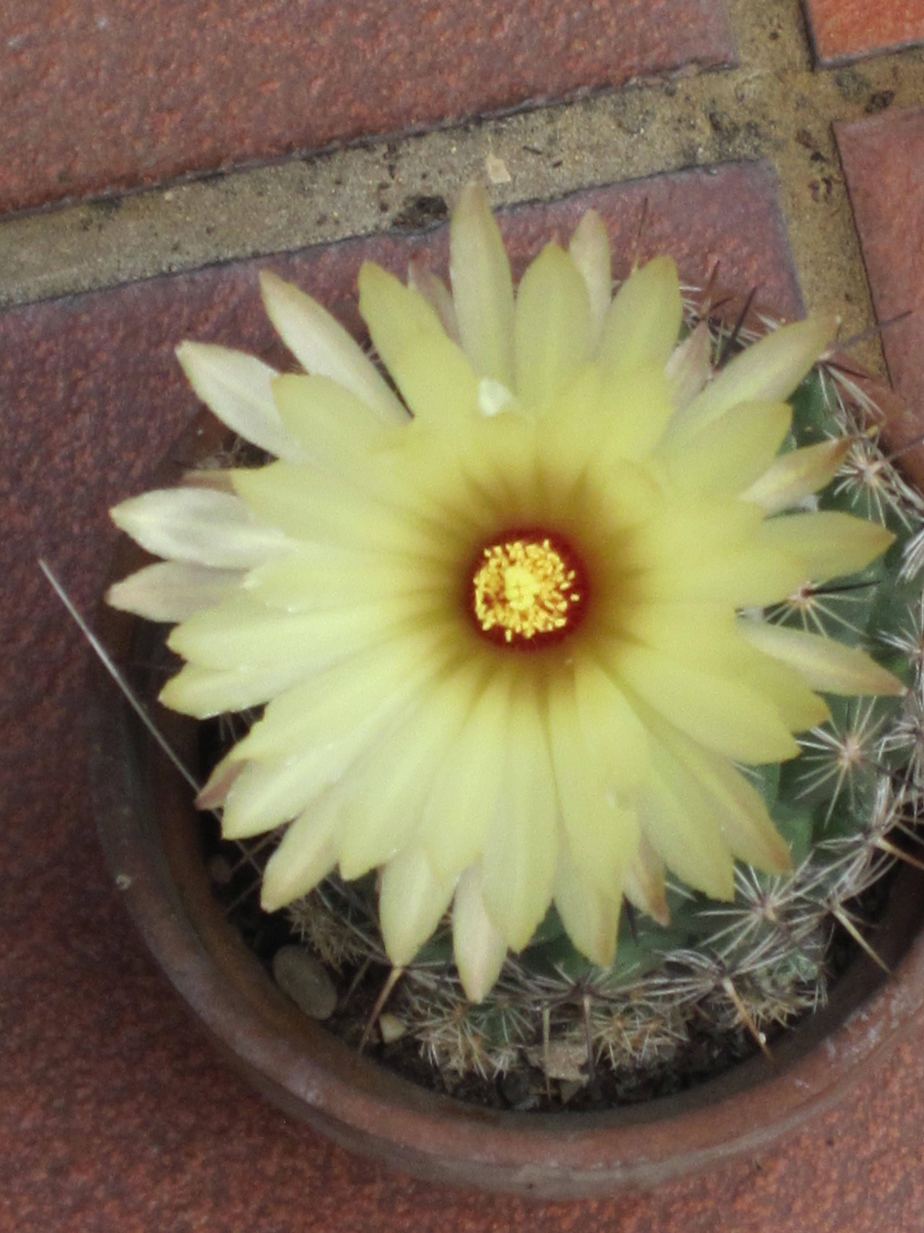 Il fiore della coryphantha palmeri